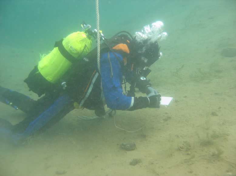 Forschungstaucher mit Schreibtafel im Kreidesee Hemmoor